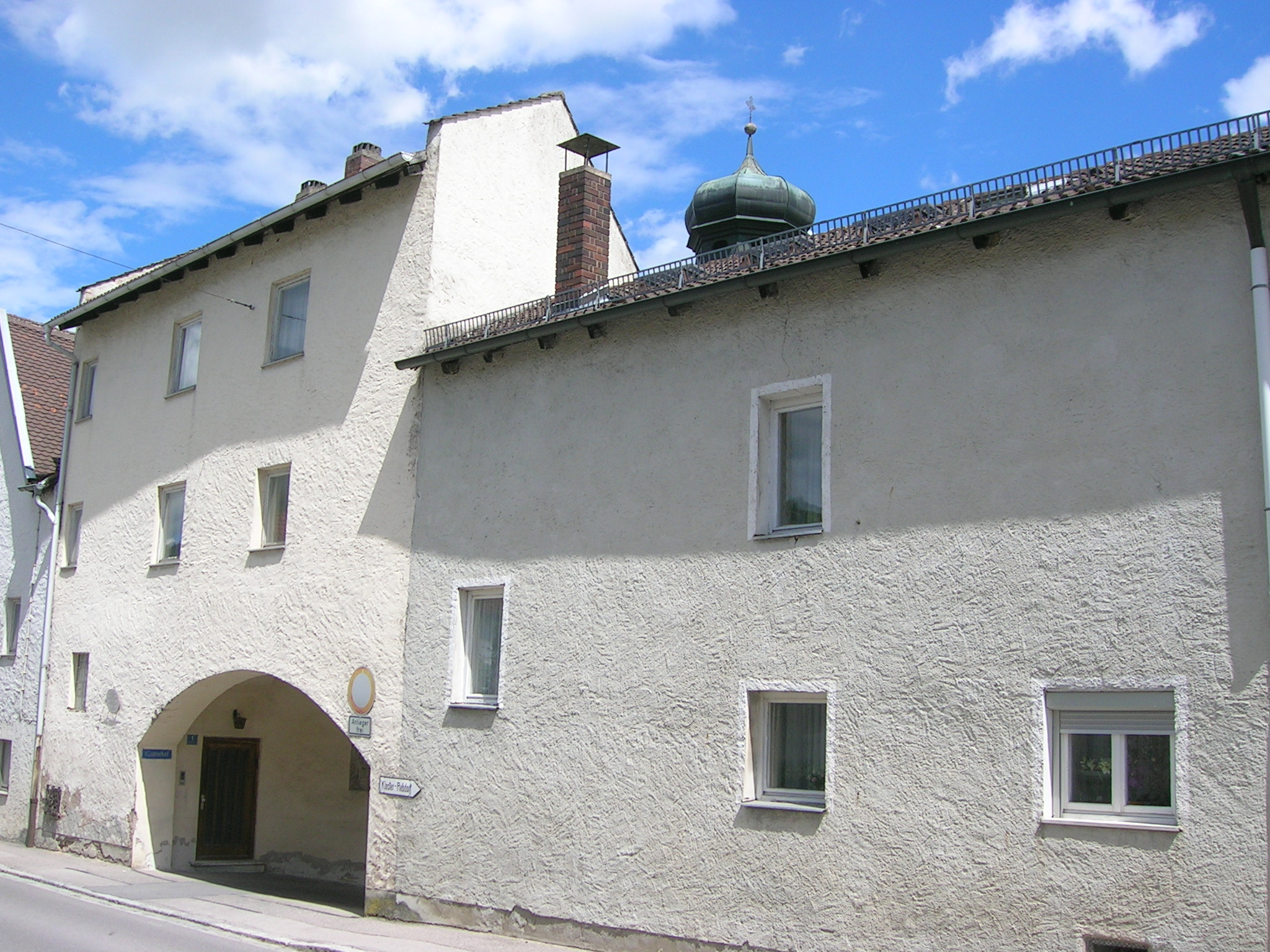 Westseite (Rebdorfer Straße) Klosterhof 1 und 2: Ehemalige Gebäude des Kloster Marienstein